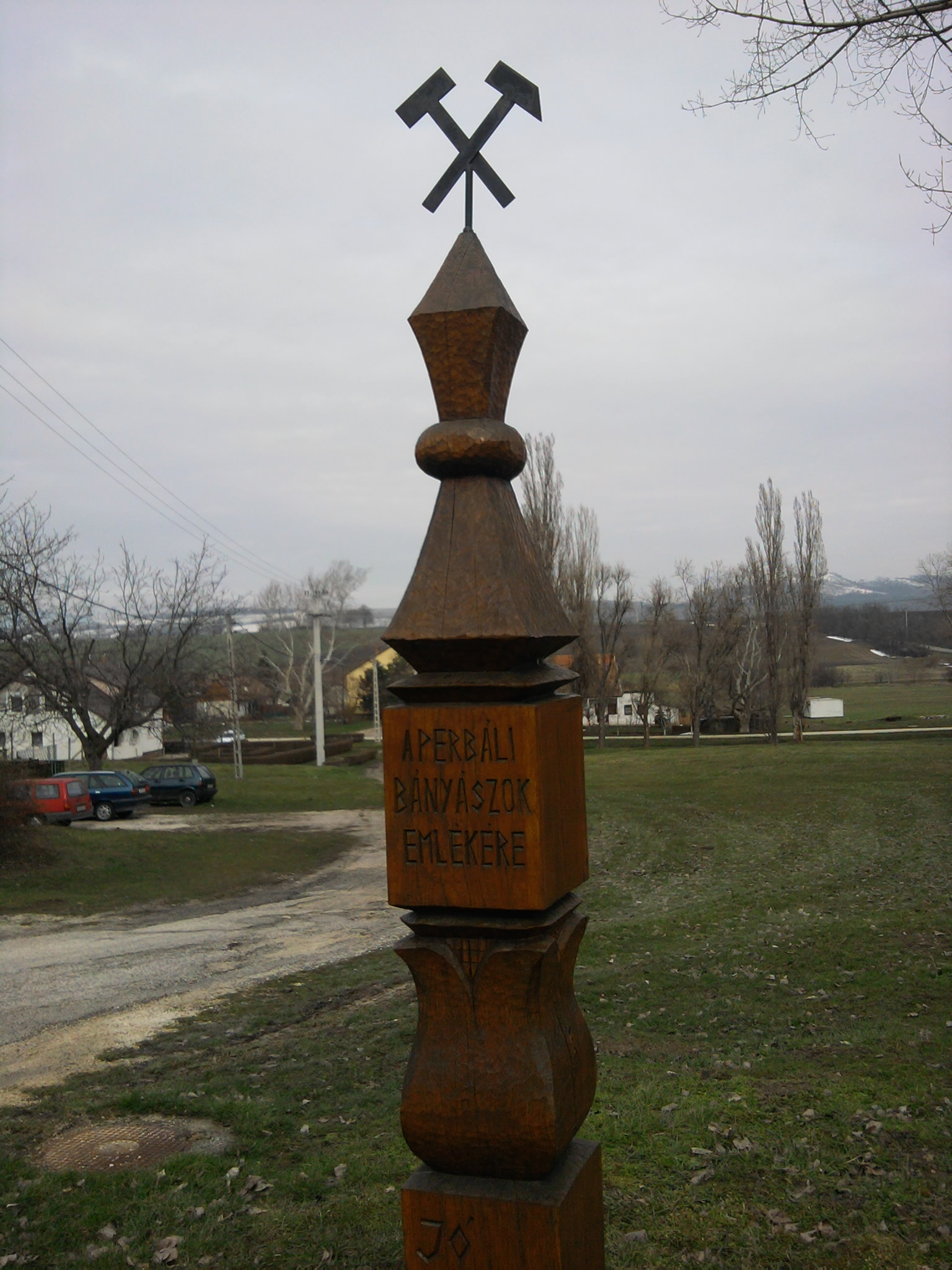 Perbáli bányászemlékmű (Pest megye)